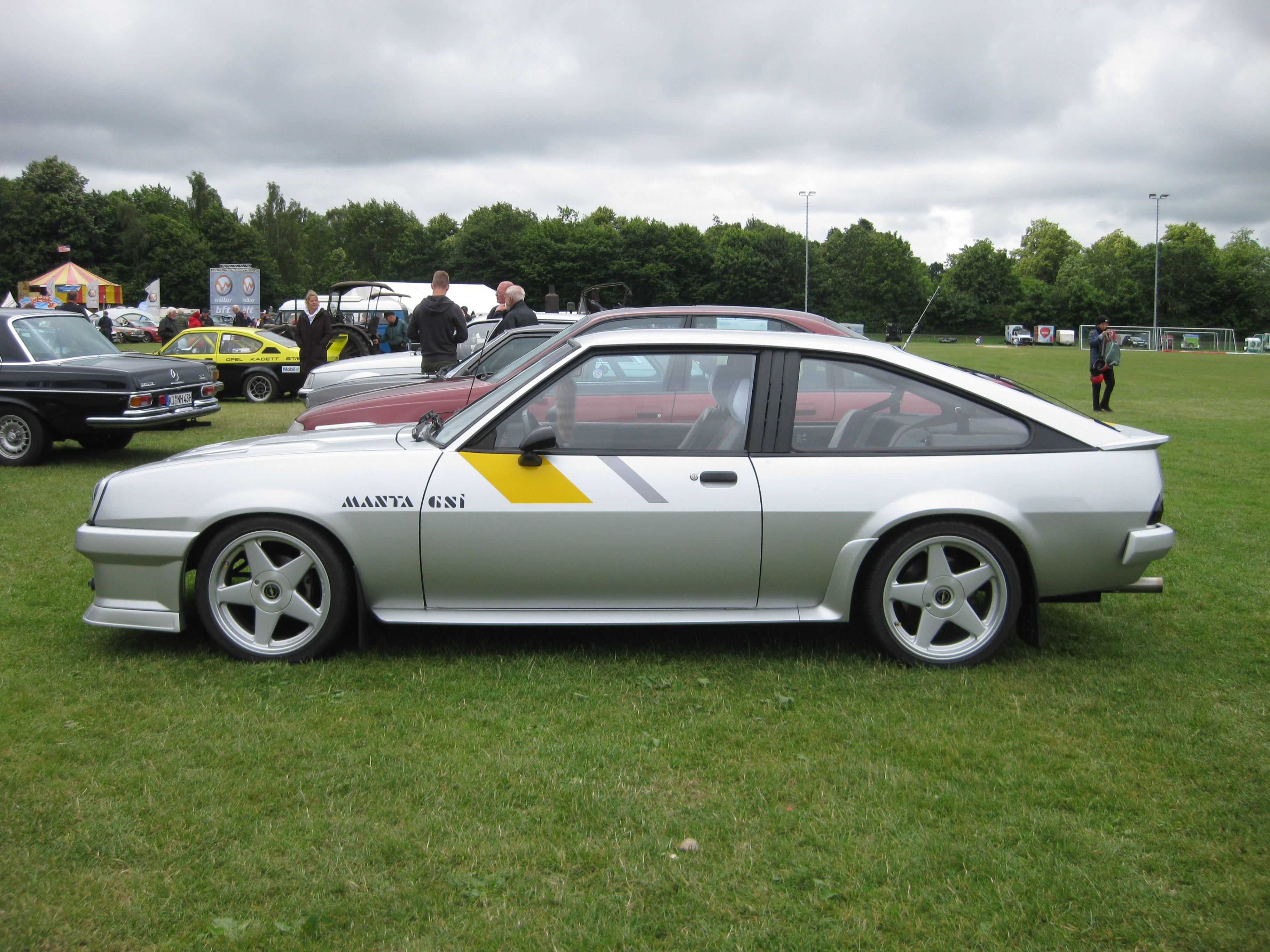 Opel Manta CC GSi Seitenansicht